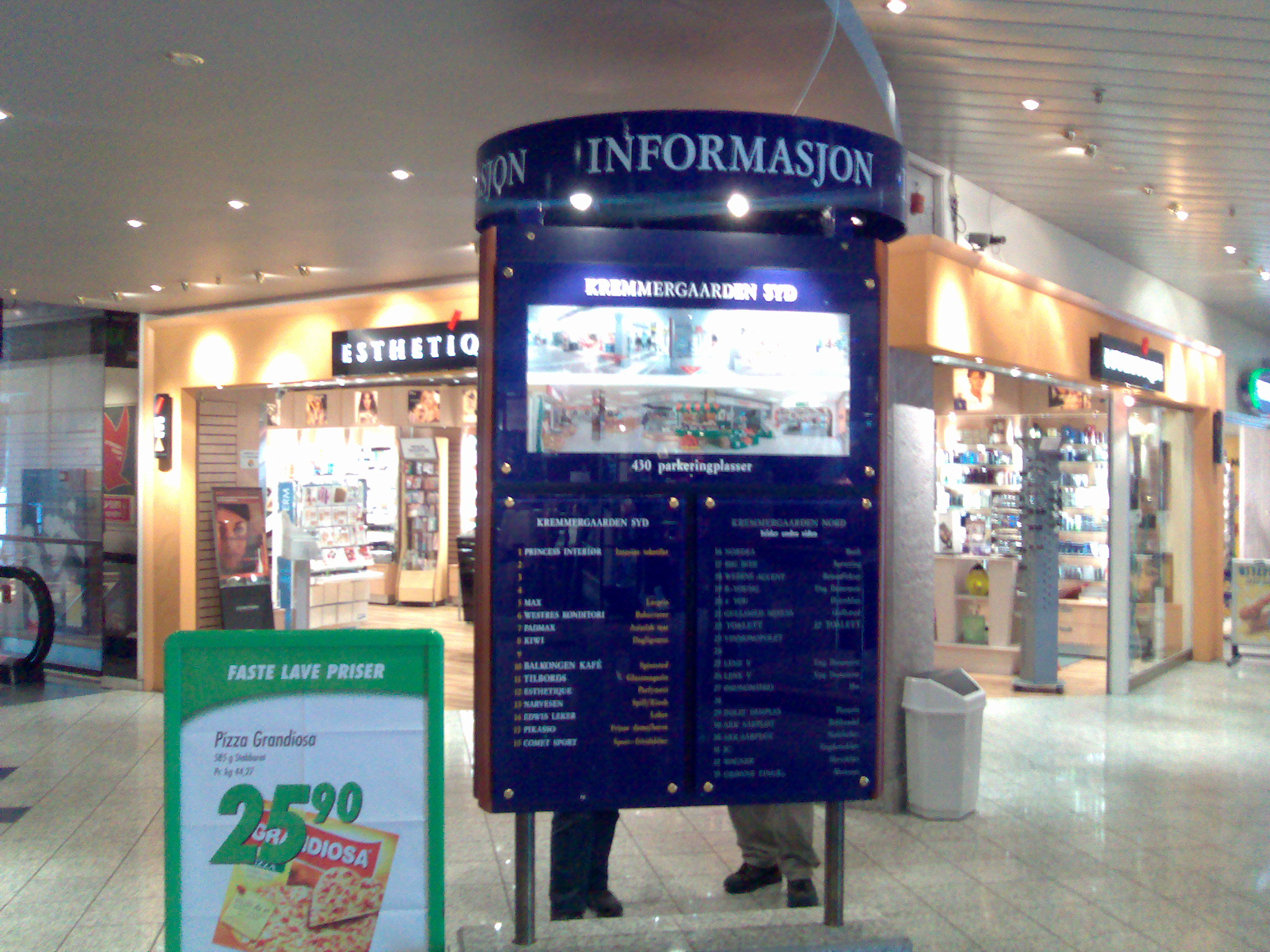 Informasjonstavle i kremmergaarden. Ålesund i Norge